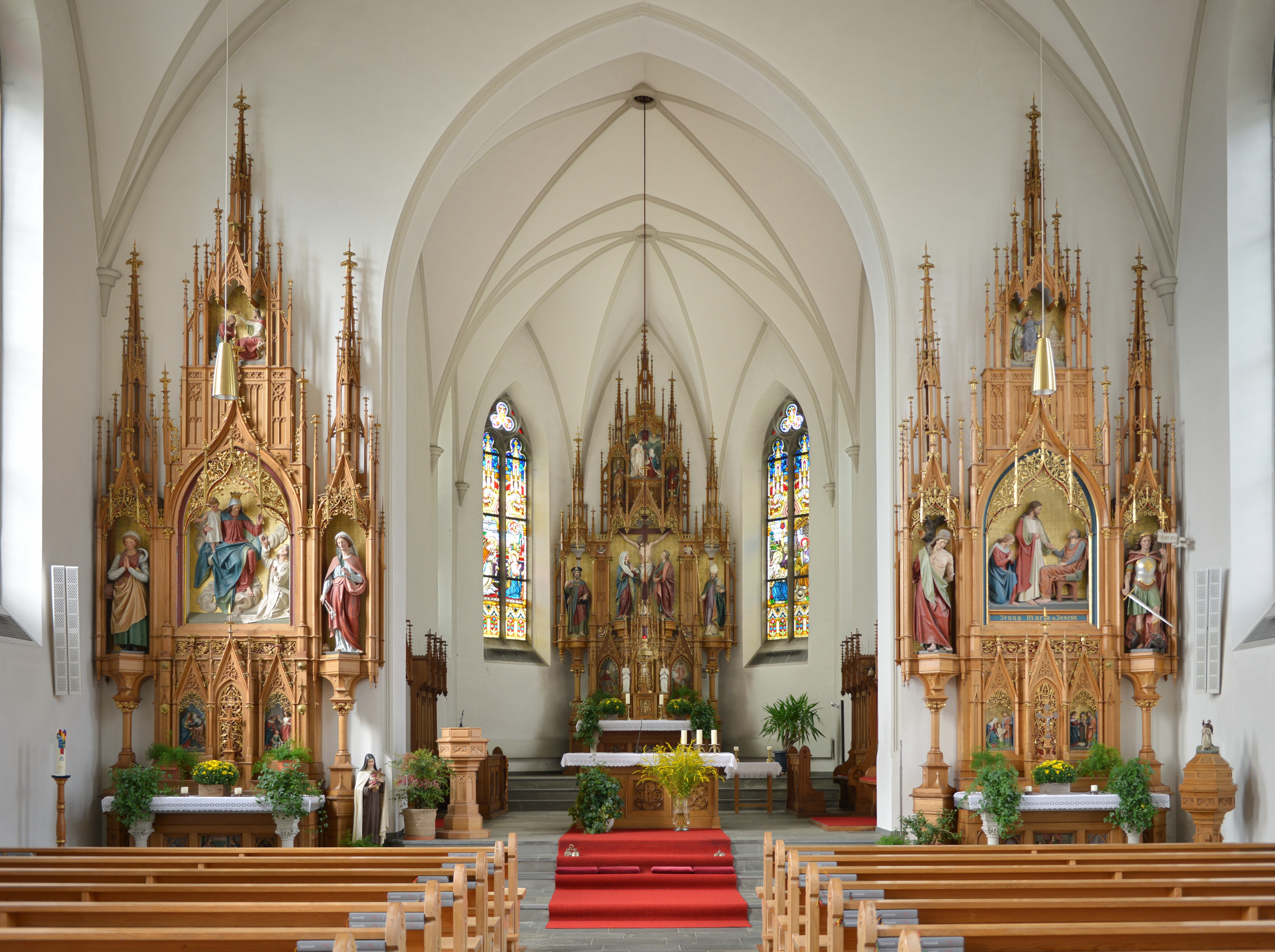 Kath. Pfarrkirche hl. Jakobus d. Ä. und Friedhof, Im Dorf 6 in Fraxern.